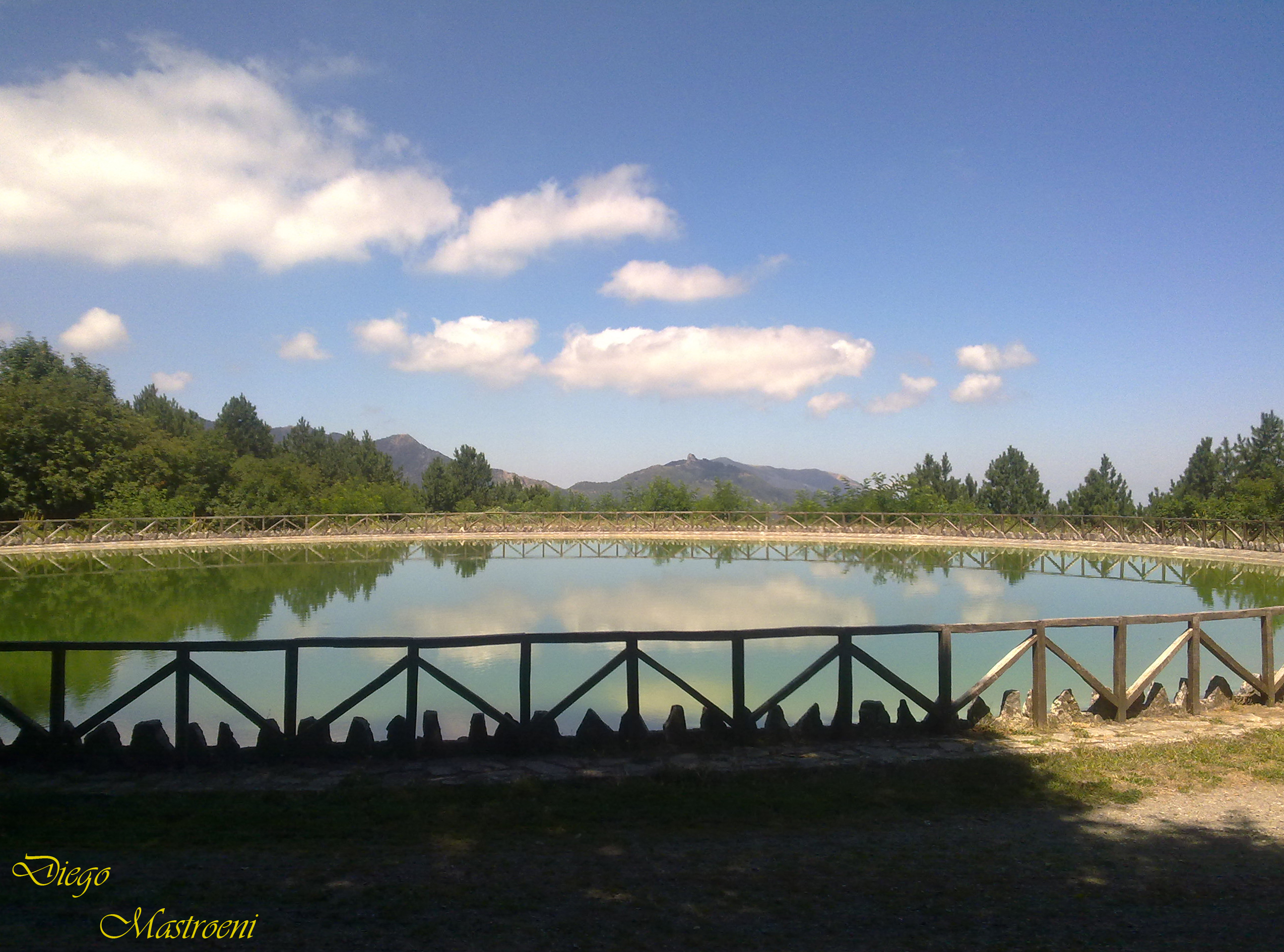 Postoleone artificial lake